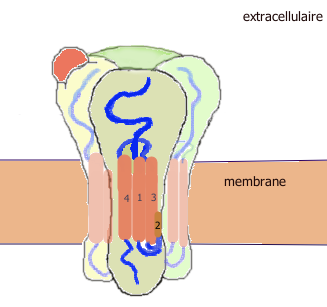 Structure des récepteurs ionotropes tétramériques du glutamate